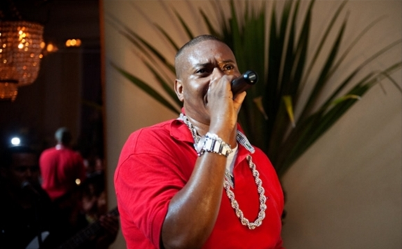 MC sapão durante um festa de casamento em 2010